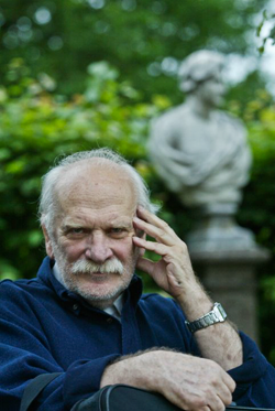 Петр Фоменко, премия «Хрустальная Турандот»